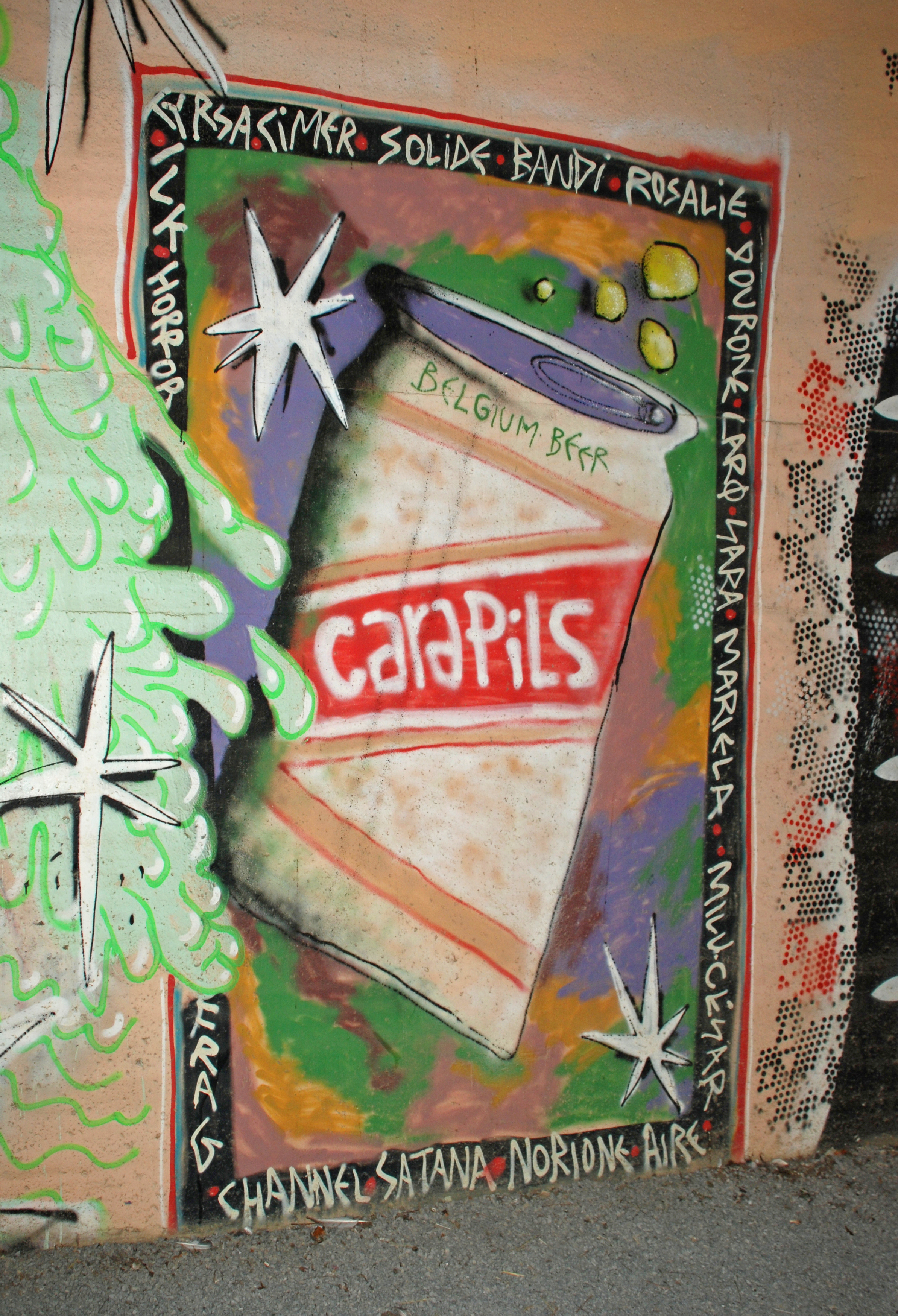 Belgique - Louvain-la-Neuve - Gare - Quai - Bières belges - Aitor Cara et Johan Baggio (Kosmopolite Art Tour 2015 à Louvain-la-Neuve)